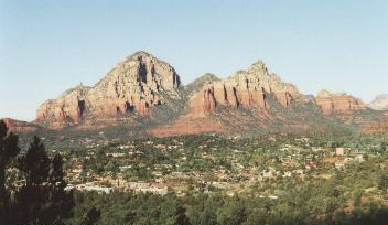 Sedona, Arizona